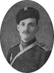 Подпоручик граф Алексей Александрович Мусин-Пушкин, убитый в Первую мировую войну.